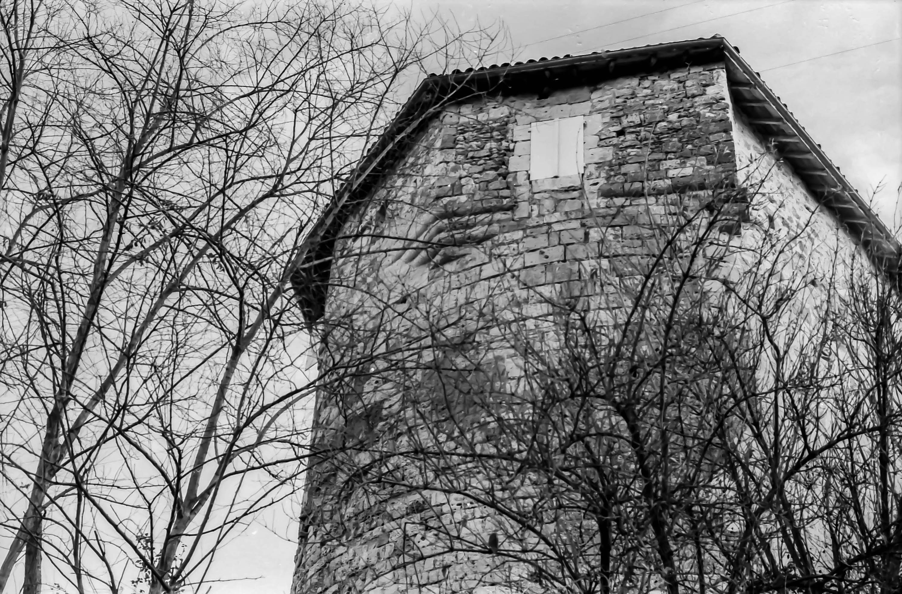 Lectoure, Gers, France : tour du Bourreau, ou tour de Corhaut, XIVe s.